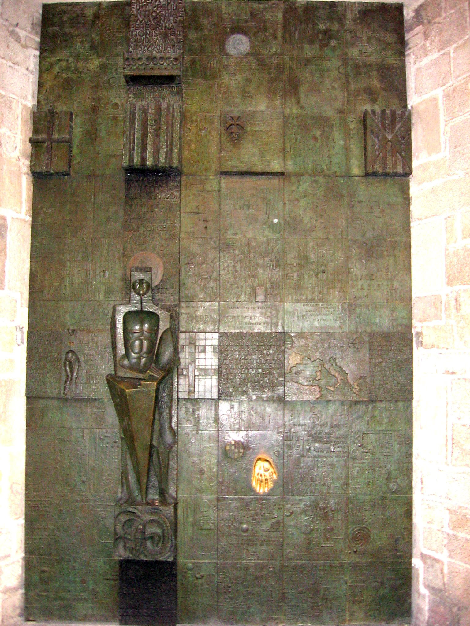 Puerta de San Jorge, de Josep Maria Subirachs, Palau del Lloctinent, Barcelona.